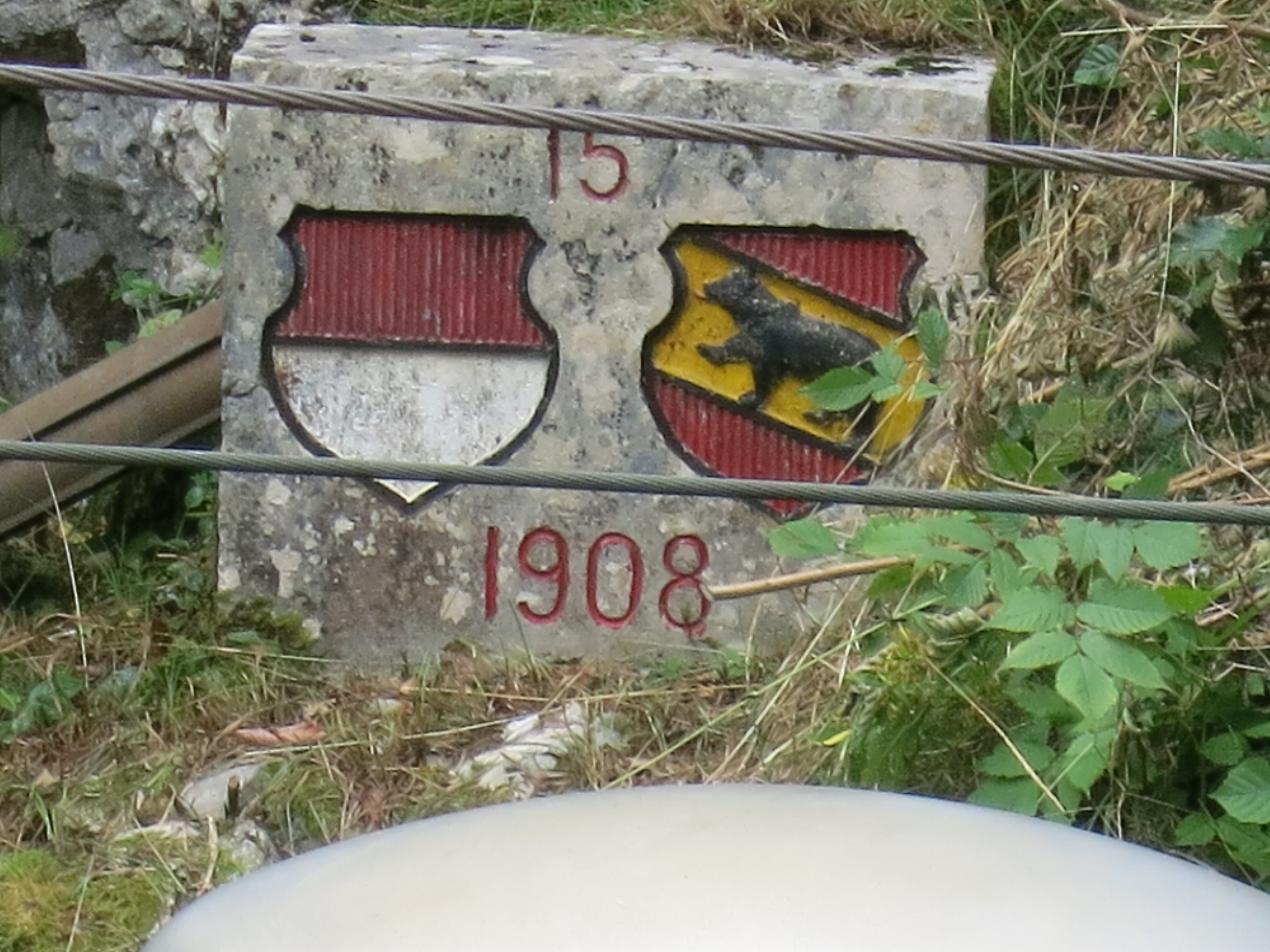 Bahnhof Gänsbrunnen SO, Schweiz